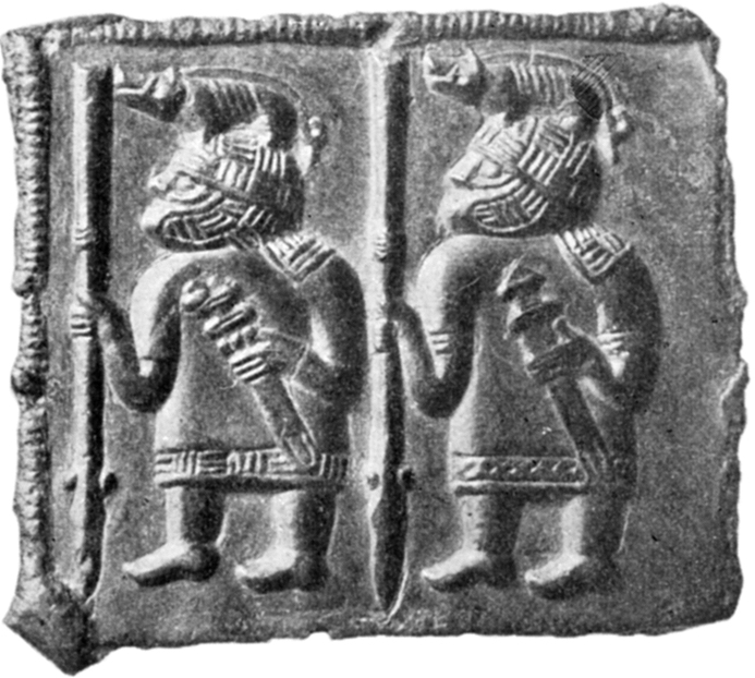 En hjälmbleckspatris med två krigare med svin på hjälmarna från Björnhovda, Torslunda socken, Algutsrums härad, Mörbylånga kommun, Öland, Kalmar län, Sverige. Fig. 1 ur artikeln "Hjälmar och svärd i Beovulf" av Knut Stjerna ur en festskrift till Oscar Montelius utgiven 1903.